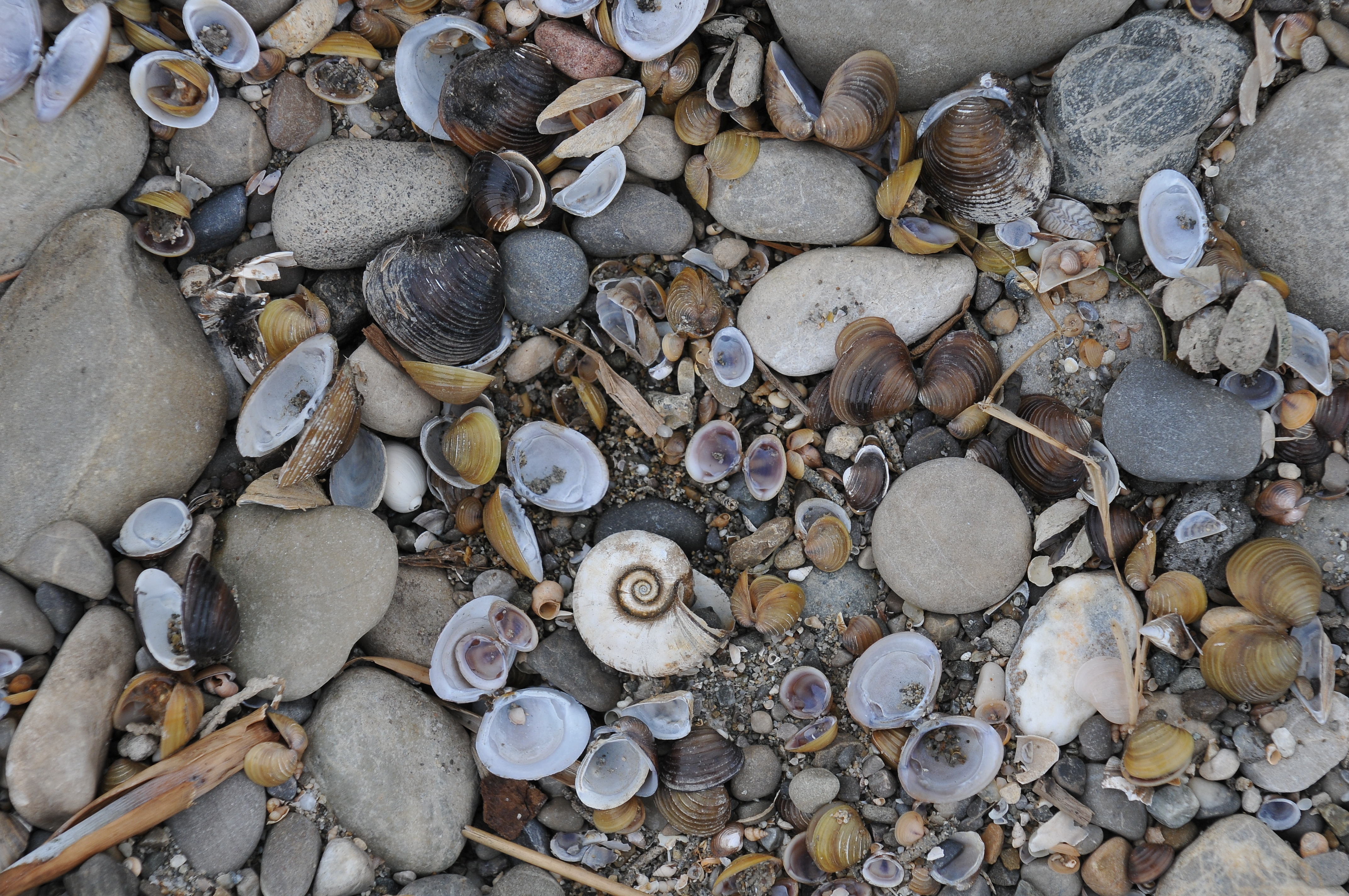 Die Posthornschnecke (Planorbarius corneus) ist ein Vertreter der Wasserlungenschnecken (Basommatophora) und wird zur Familie der Tellerschnecken (Planorbidae) gerechnet.